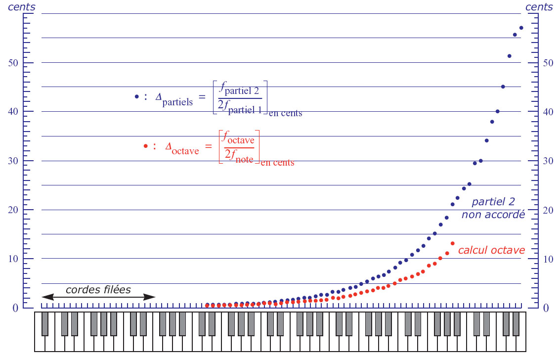 Inharmonicité du piano, graphique des mesures 1